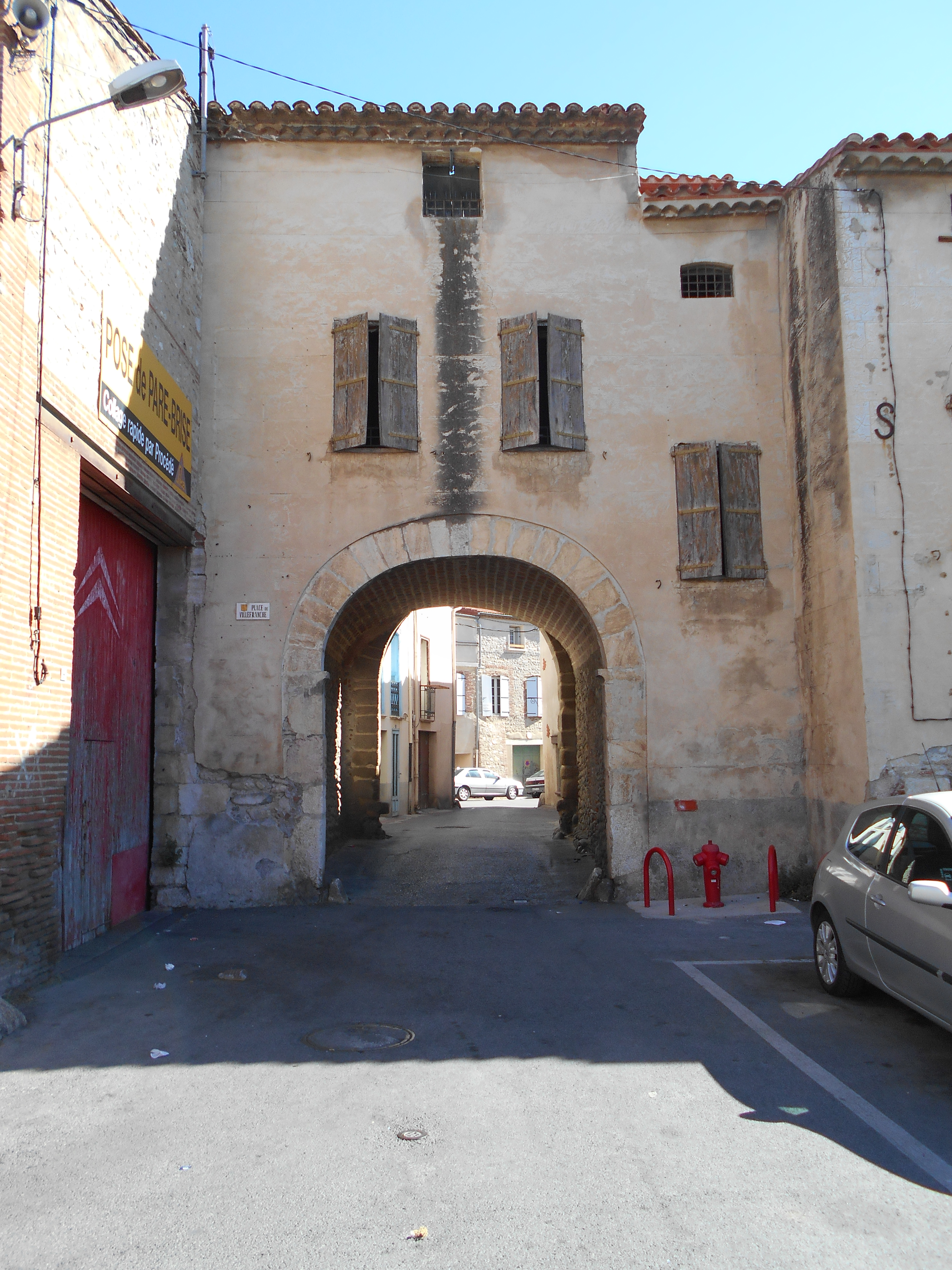 Porta de Vilafranca, part defora.